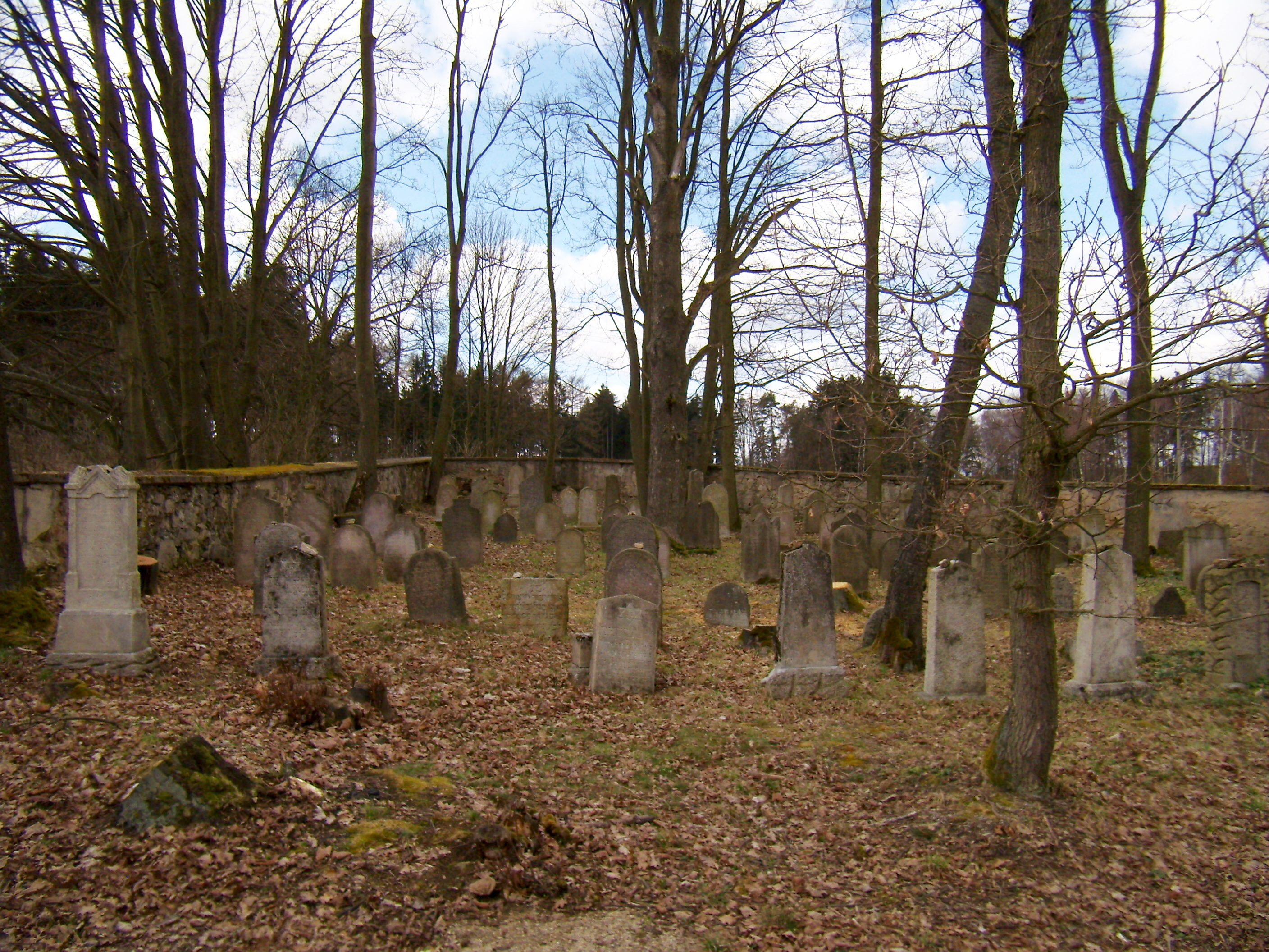 Židovský hřbitov u Malé Šitboře